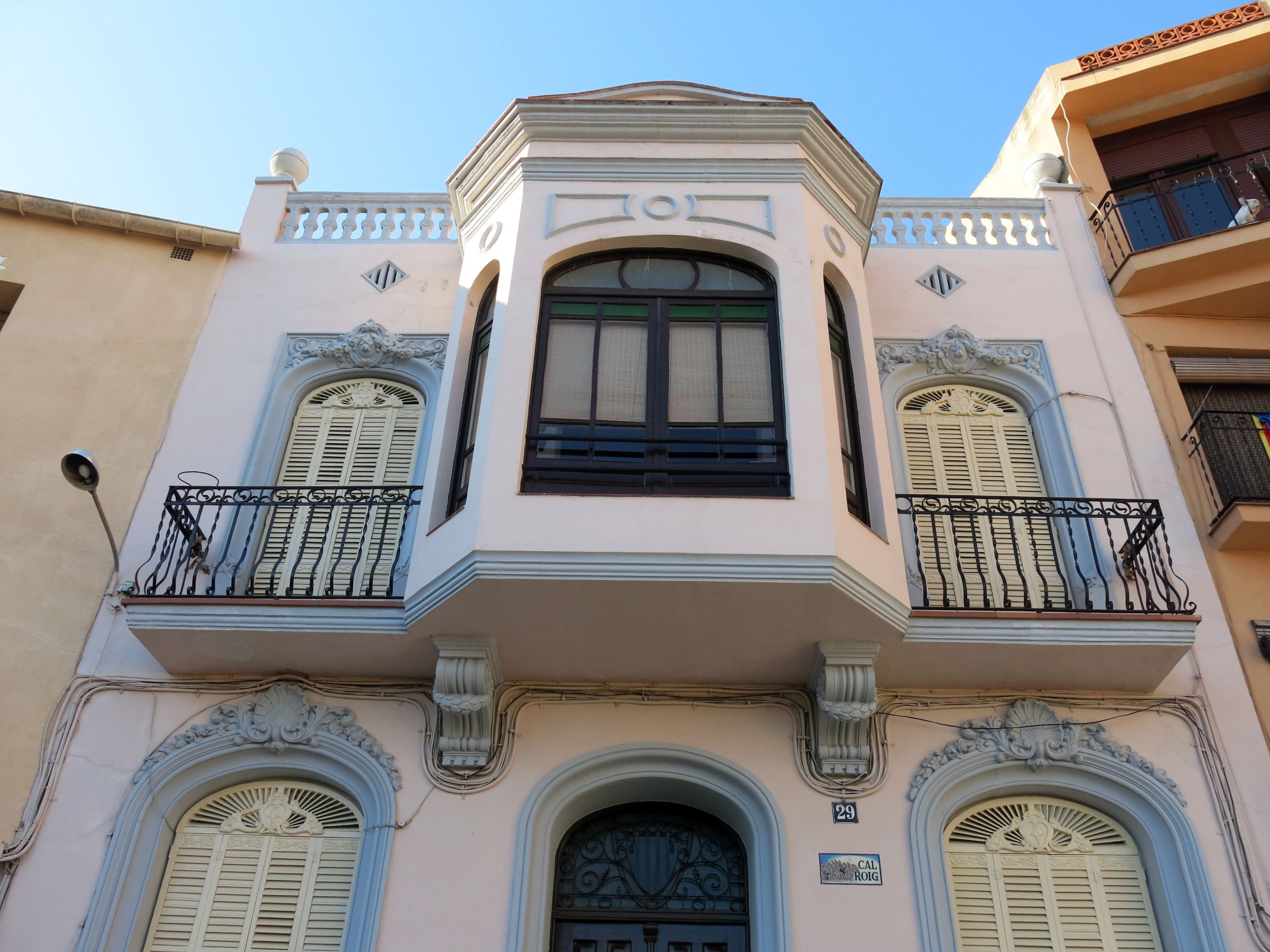 Cal Roig, o casa del Doctor Juncà (Monistrol de Montserrat)